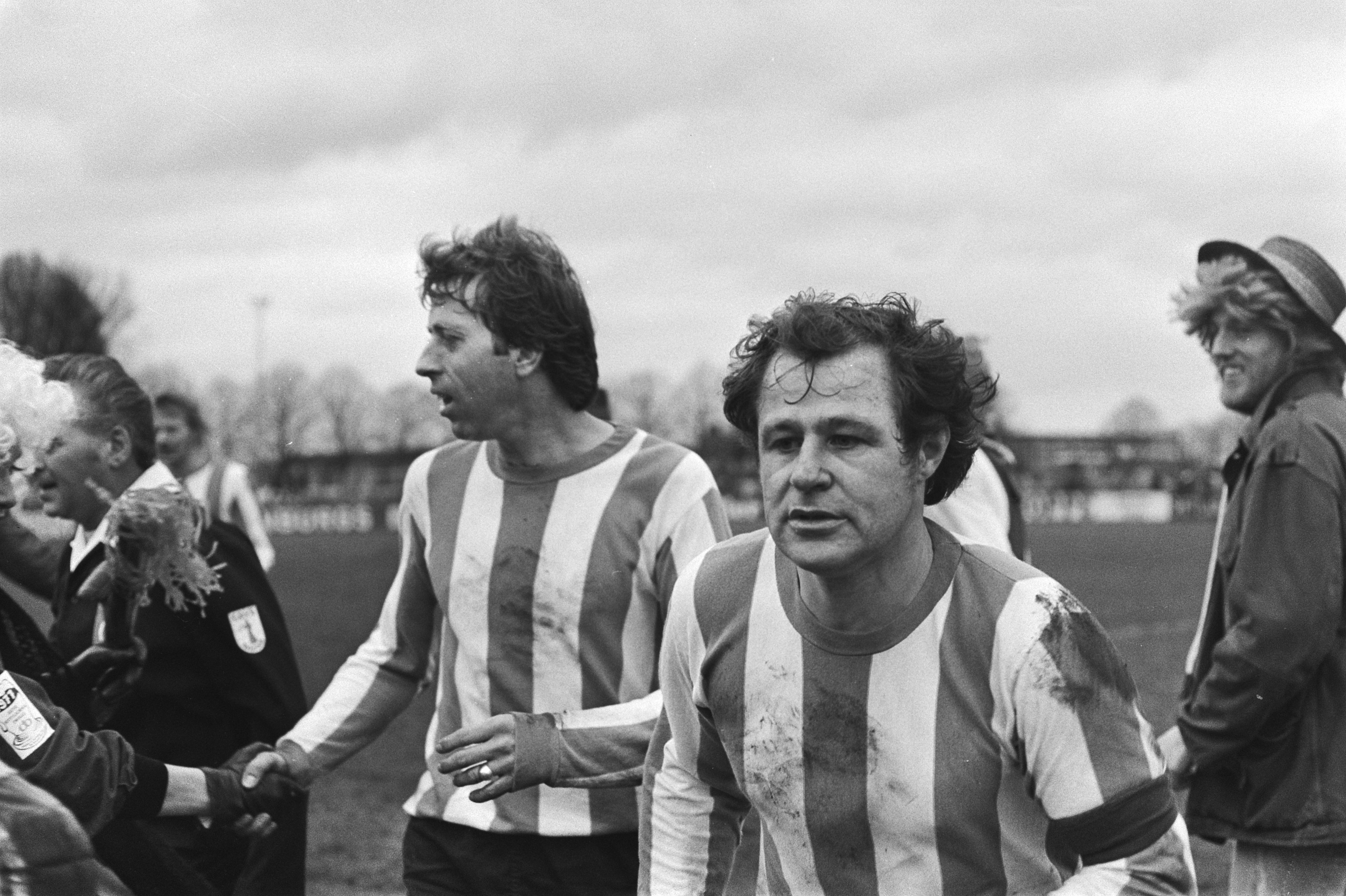 Collectie / Archief : Fotocollectie Anefo Reportage / Serie : [ onbekend ] Beschrijving : PEC Zwolle tegen Telstar 2-1 (KNVB); juichende PEC-spelers verlaten het veld met Rinus Israel (r.) Datum : 20 februari 1977 Trefwoorden : sport, voetbal Persoonsnaam : Israël, Rinus Instellingsnaam : PEC Zwolle Fotograaf : Peters, Hans / Anefo Auteursrechthebbende : Nationaal Archief Materiaalsoort : Negatief (zwart/wit) Nummer archiefinventaris : bekijk toegang 2.24.01.05 Bestanddeelnummer : 929-0372